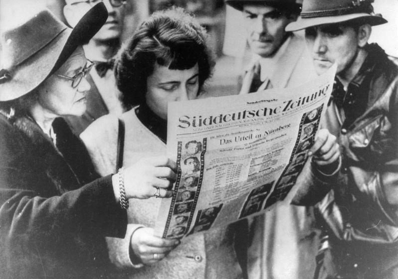 Interessierte Zeitungsleser nach der Urteilsverkündung der Nürnberger Prozesse, 1. Oktober 1945